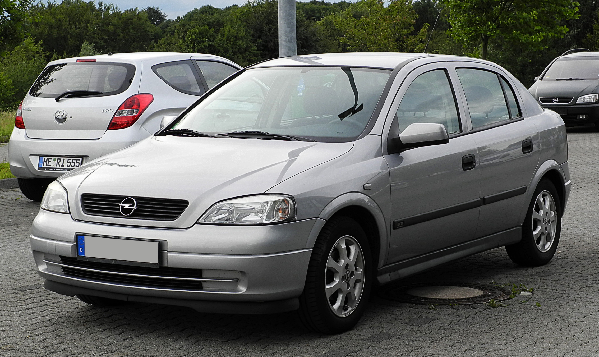 Opel Astra 1.6 Selection (G)